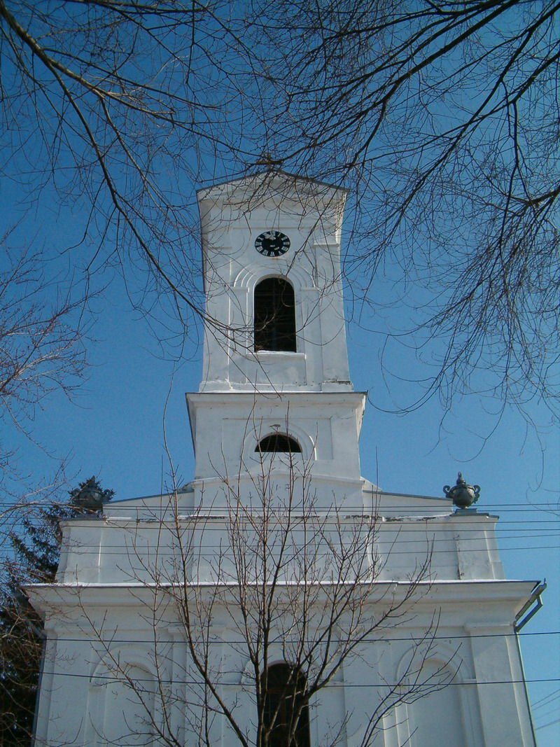 Slovačka crkva u Zrenjaninu